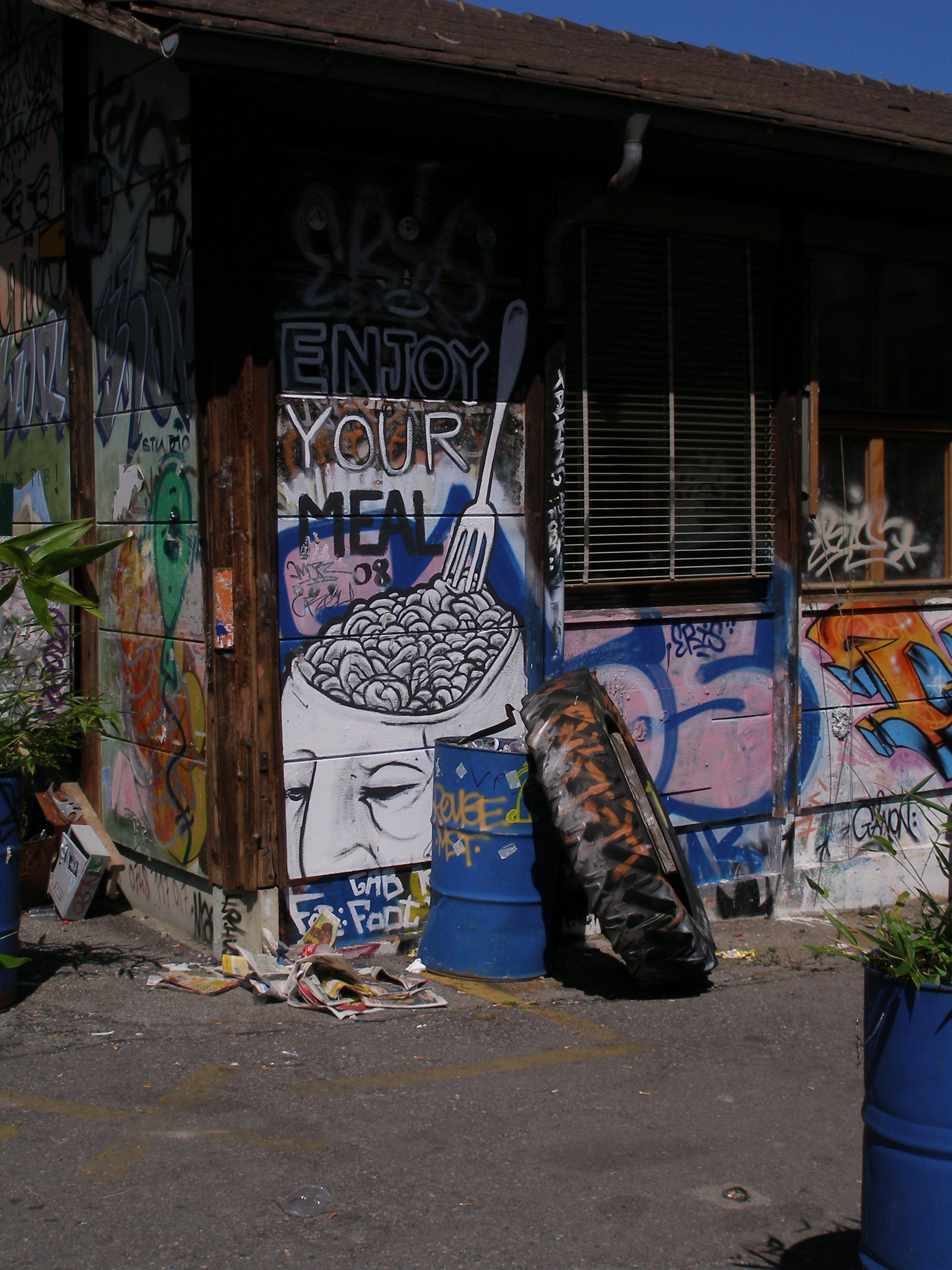 Site d'Artamis, Genève, aujourd'hui disparu